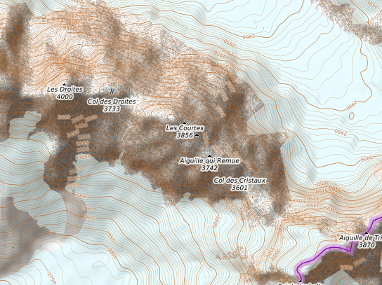 carte réalisée sur umap This map may be incomplete, and may contain errors. Don't rely solely on it for navigation.